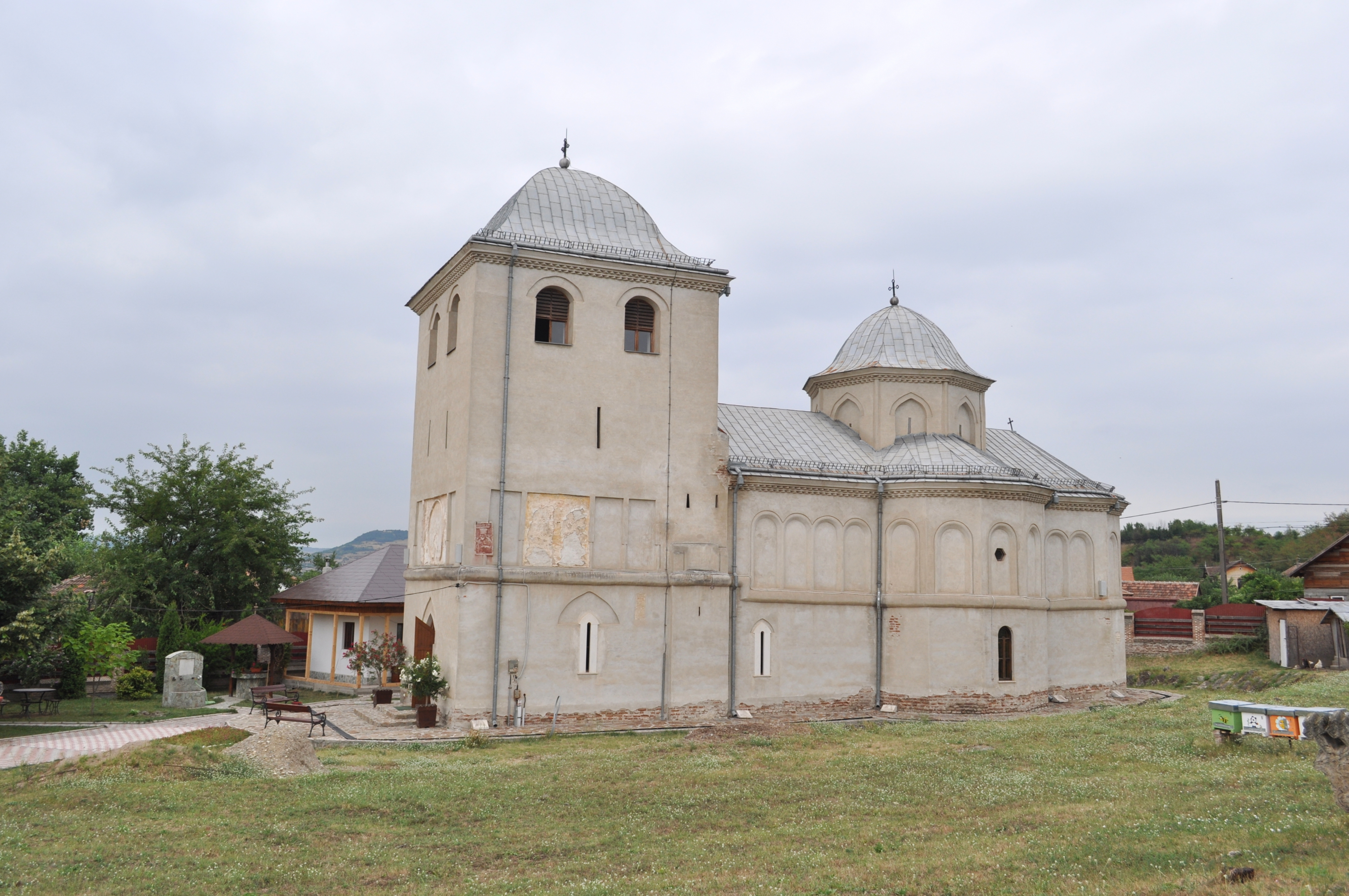 Biserica „Sfânta Treime”, sat Cerneți; comuna Șimian